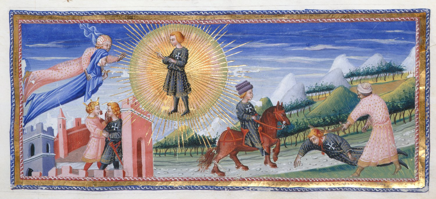 Giovanni di paolo, paradiso 28 dante e cacciaguida.jpg